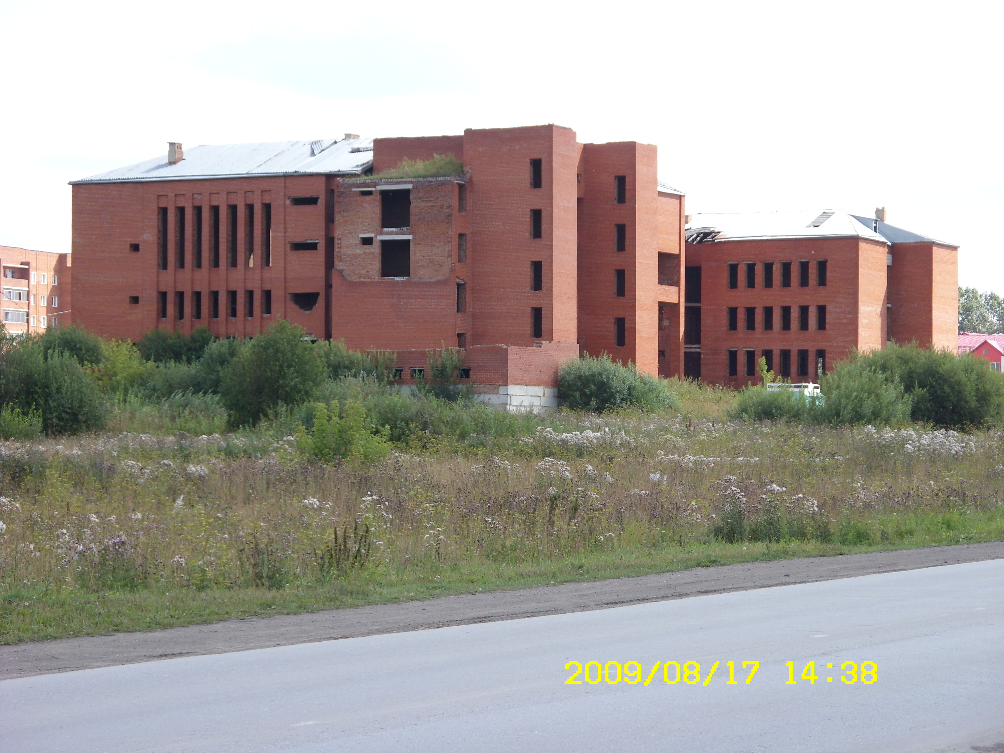 Вид на легендарный дом правосудия.